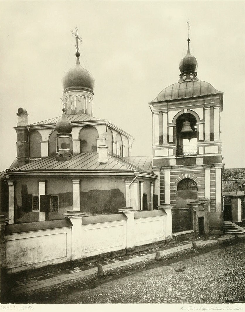 Храм Зачатия Анны «что в Углу»